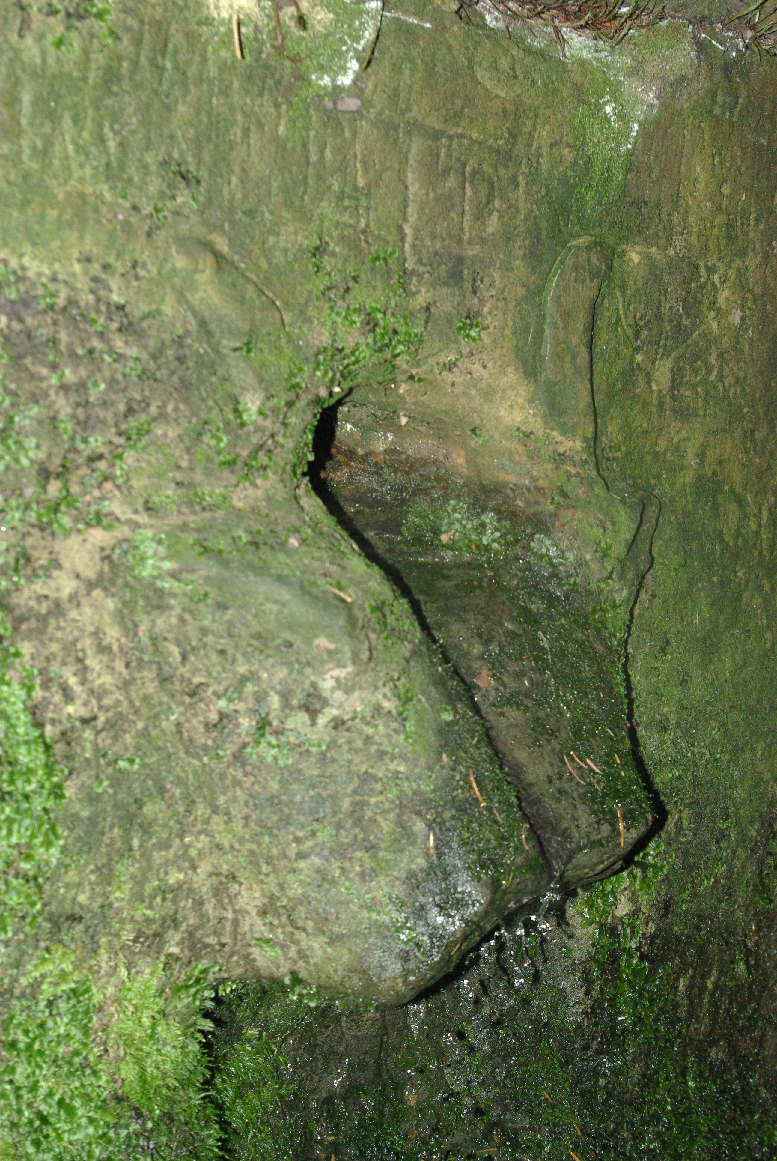 Fontaine le Boeuf (détail) - vallon de Saint-Martin (Vosges)